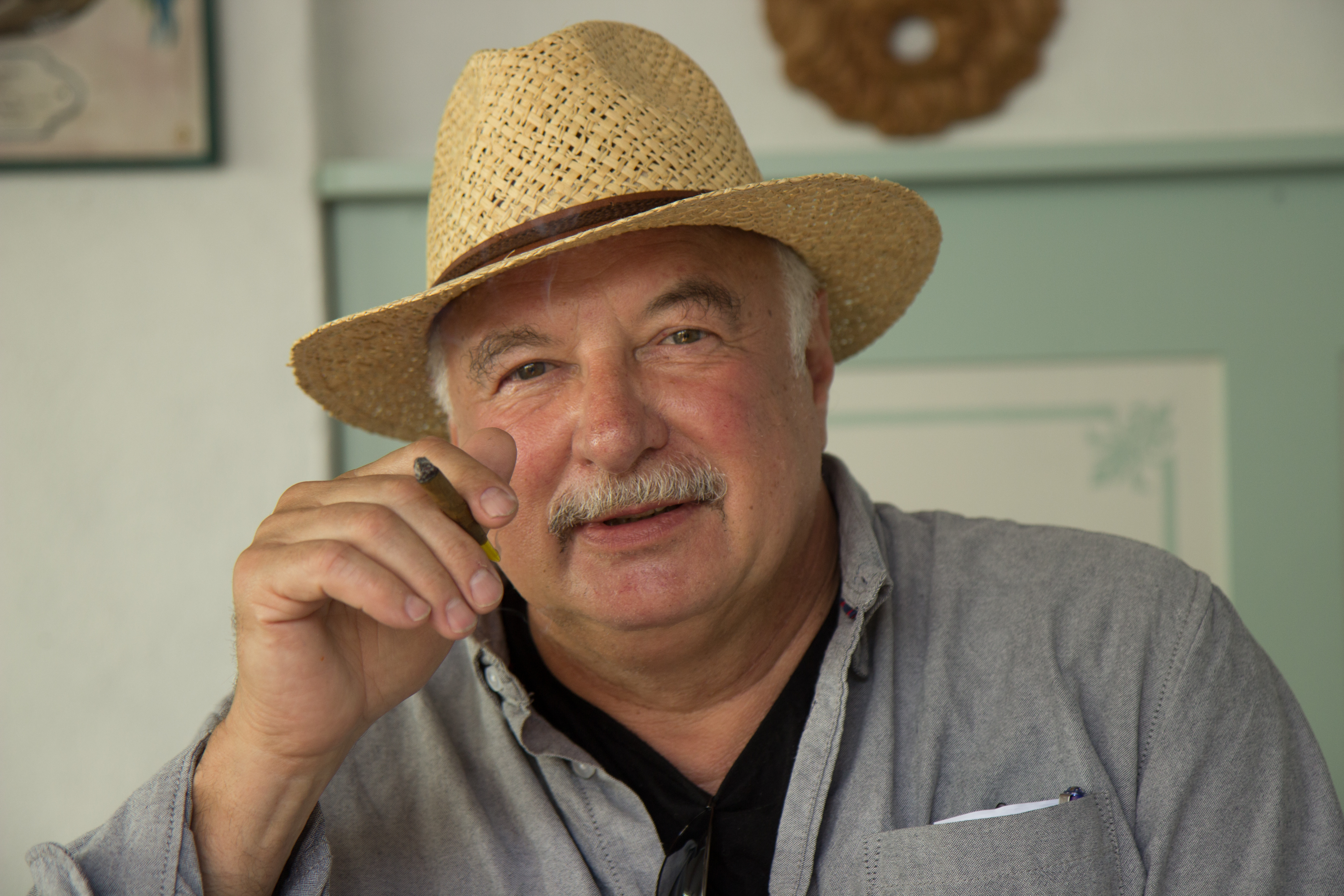 Der Schriftsteller Adrian Naef beim Hausacher Leselenz 2013